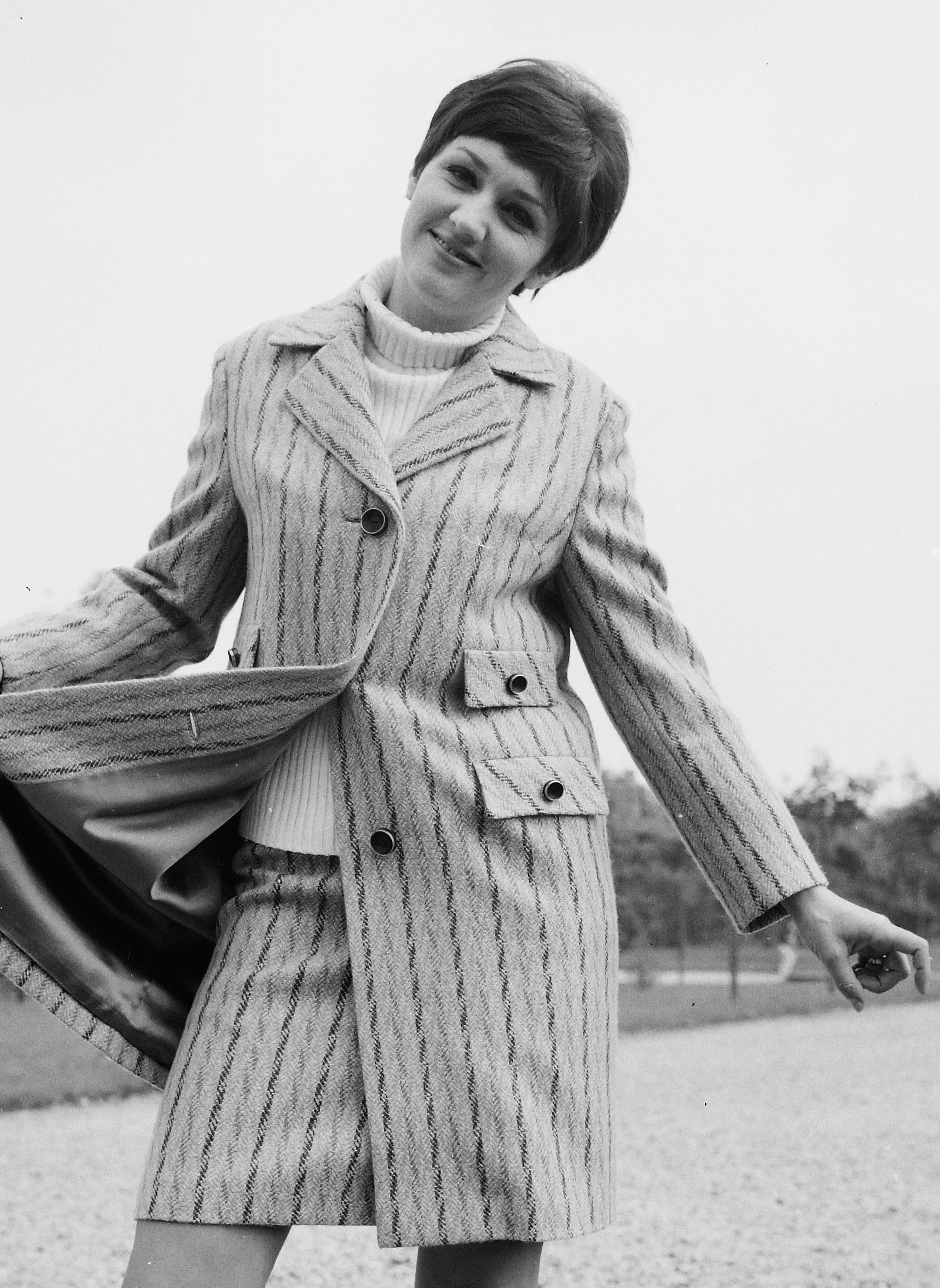 Toldy Mária énekes 1969-ben